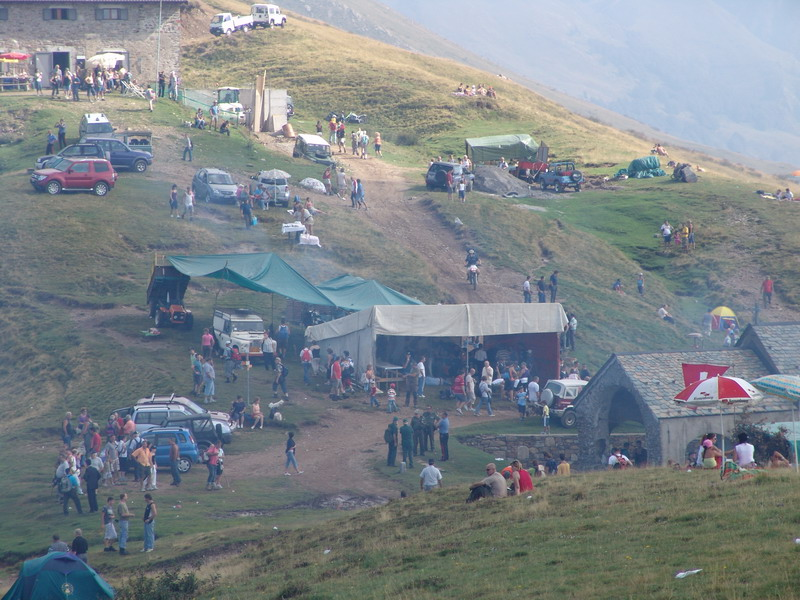 Festa di S.Rocco al Passo San Lucio.